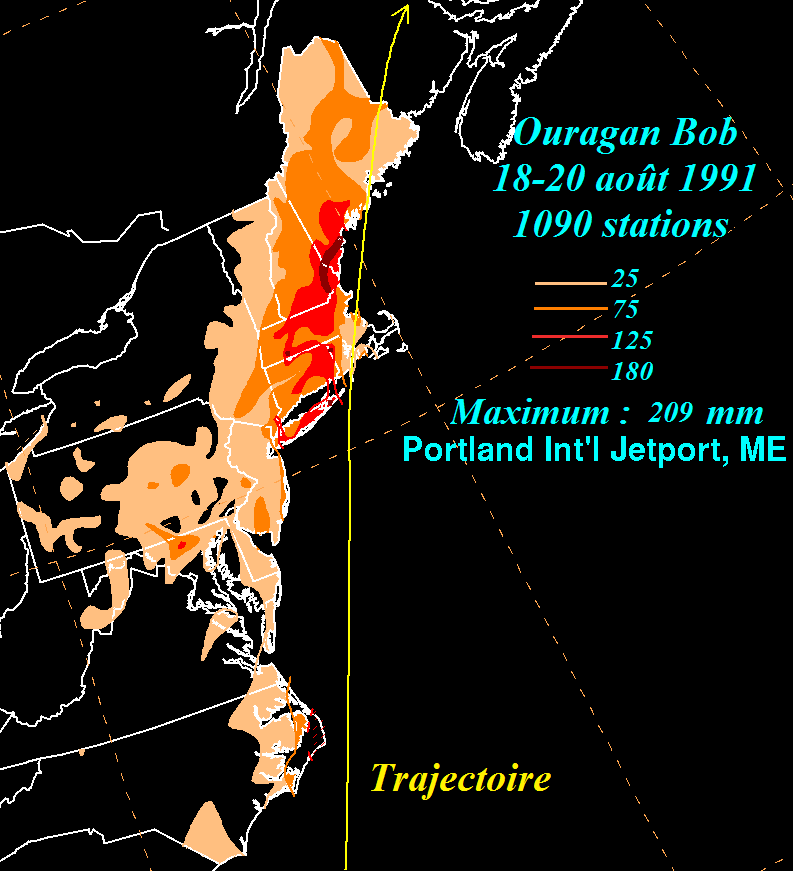 Quantités de pluie tombées aux États-Unis lors du passage de l'ouragan Bob de 1991 (en français et millimètres